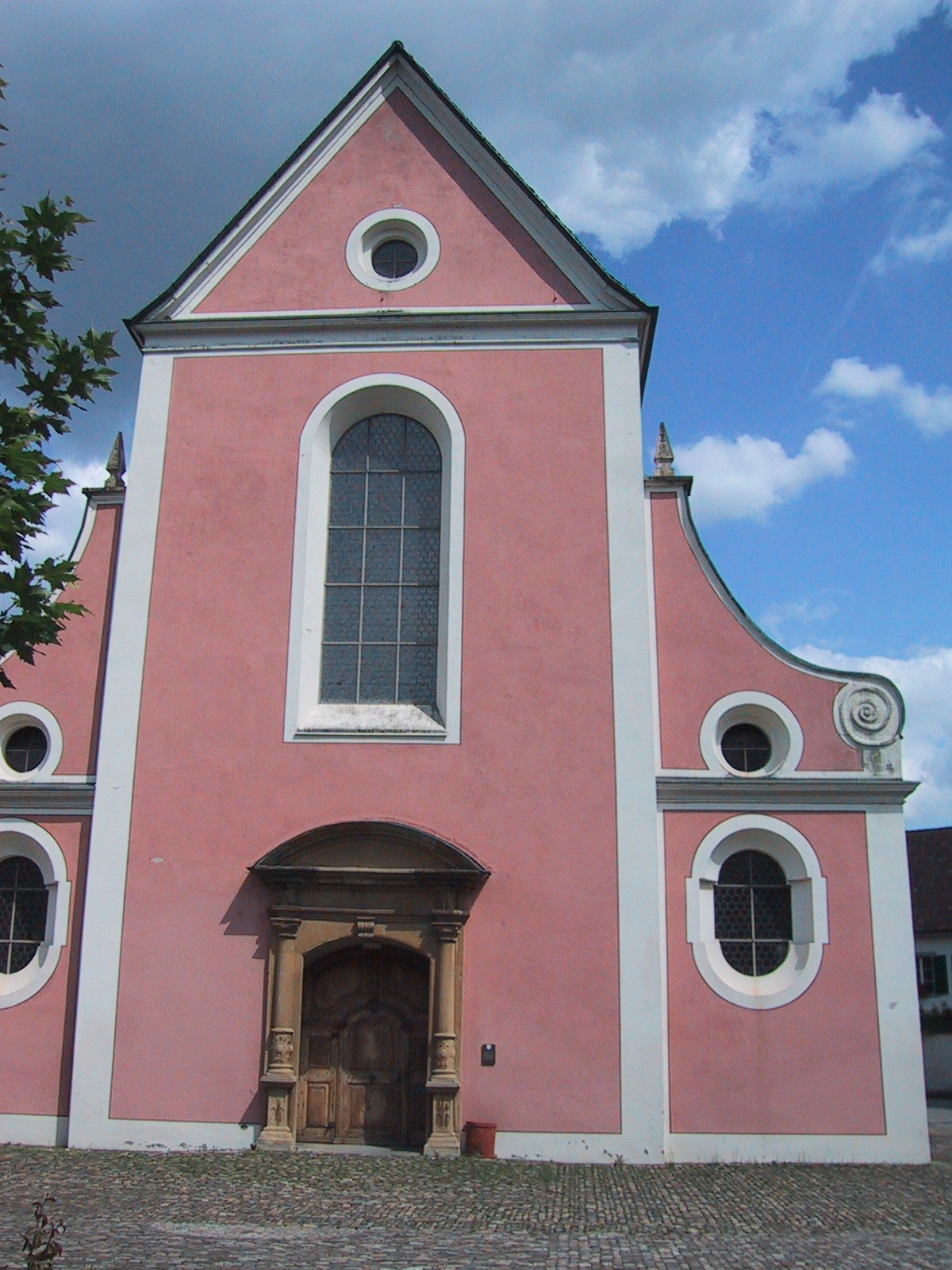 Fassade des Verenamünsters in Zurzach, Kanton Aargau, Schweiz.